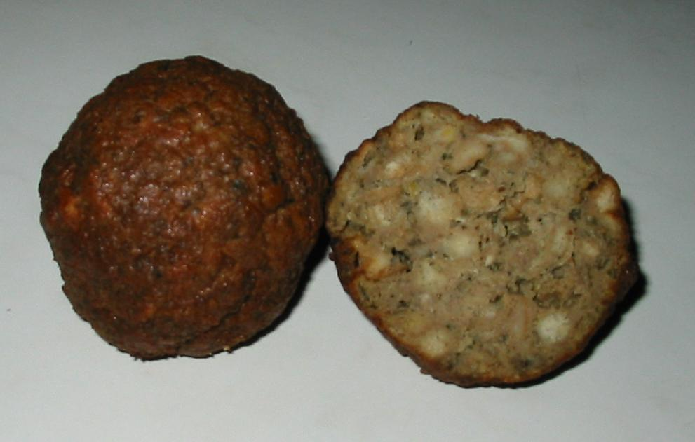 Leberknödel, frittiert.